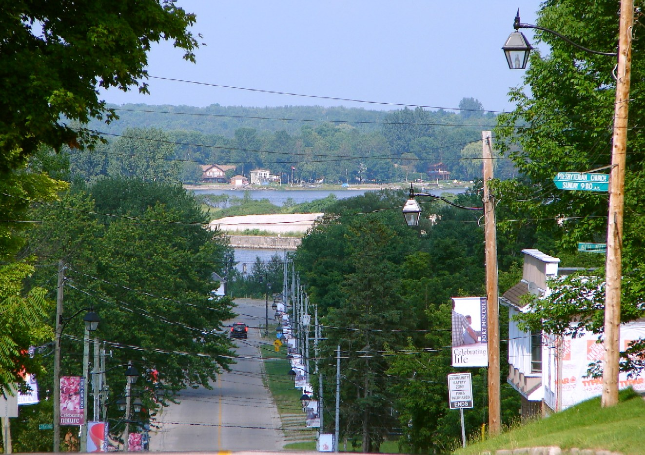 Port McNicoll, Ontario, Canada